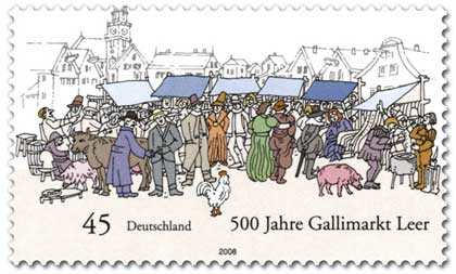 500 Jahre Gallimarkt in Leer (Ostfriesland), 45 cent